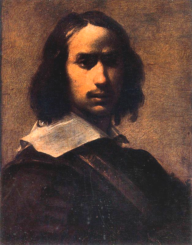 Francesco Cairo Autorretrato Uffizi Corredor Vasariano